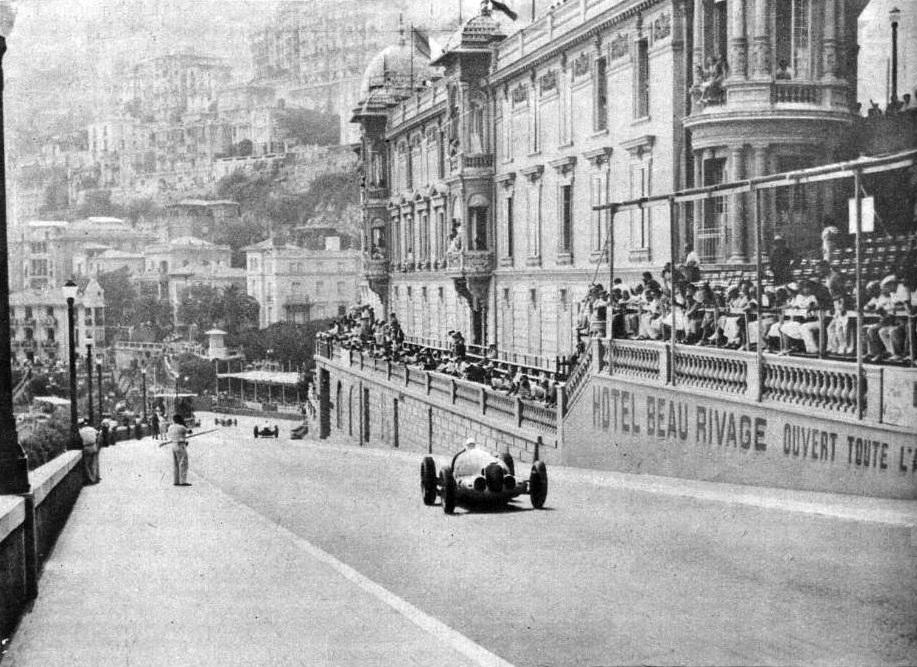 L'ascension de la côte de Monte-Carlo par Rudolf Caracciola (Grand Prix de Monaco 1937).